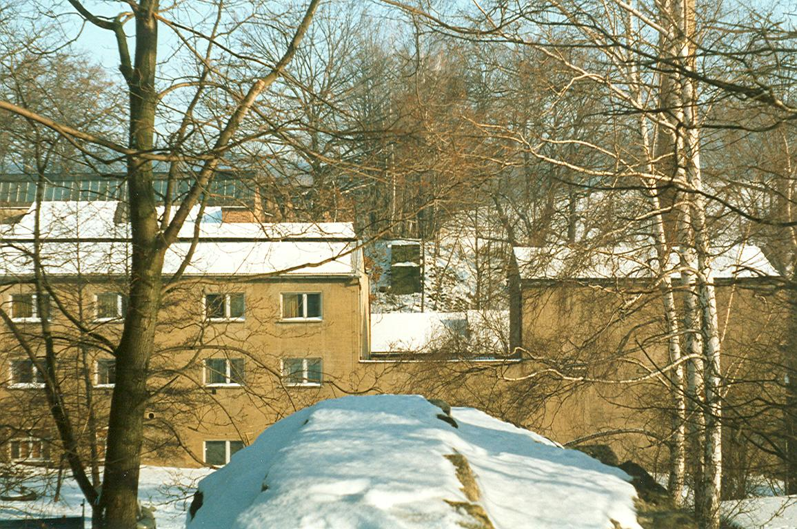 ehemaliger Viadukt in Oppach